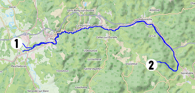 plan Durolle This map may be incomplete, and may contain errors. Don't rely solely on it for navigation.